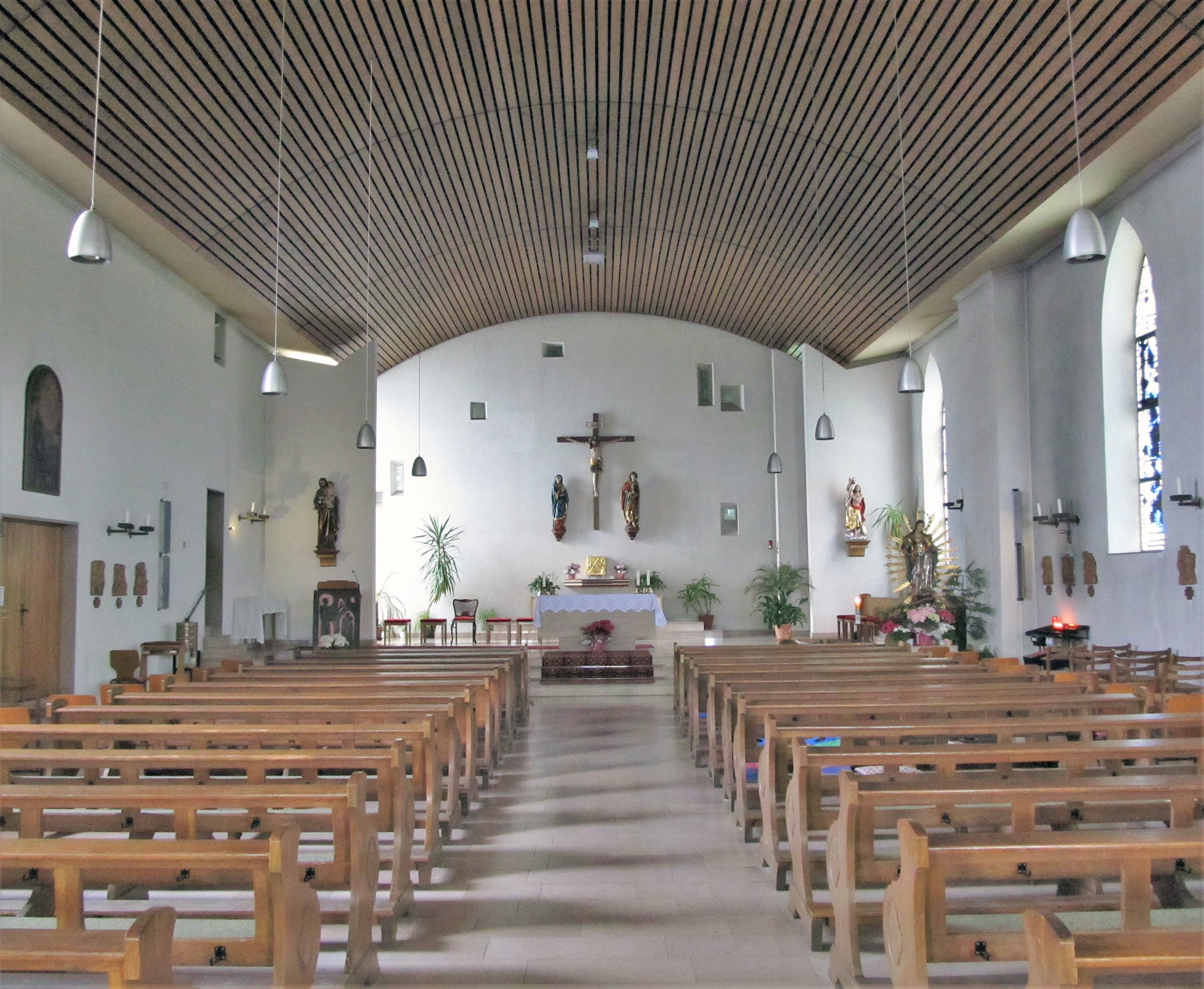 Blick ins Innere der Kirche des Klosters Blieskastel, Saarland